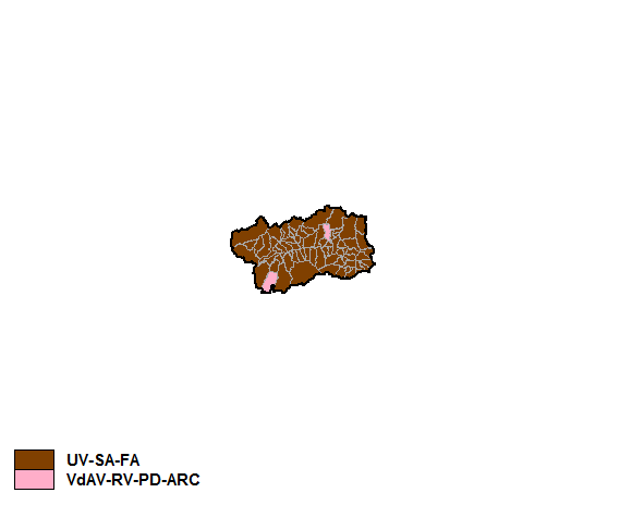 Coalizioni vincitrici comune per comune nelle Elezioni regionali in Valle d'Aosta del 2008.